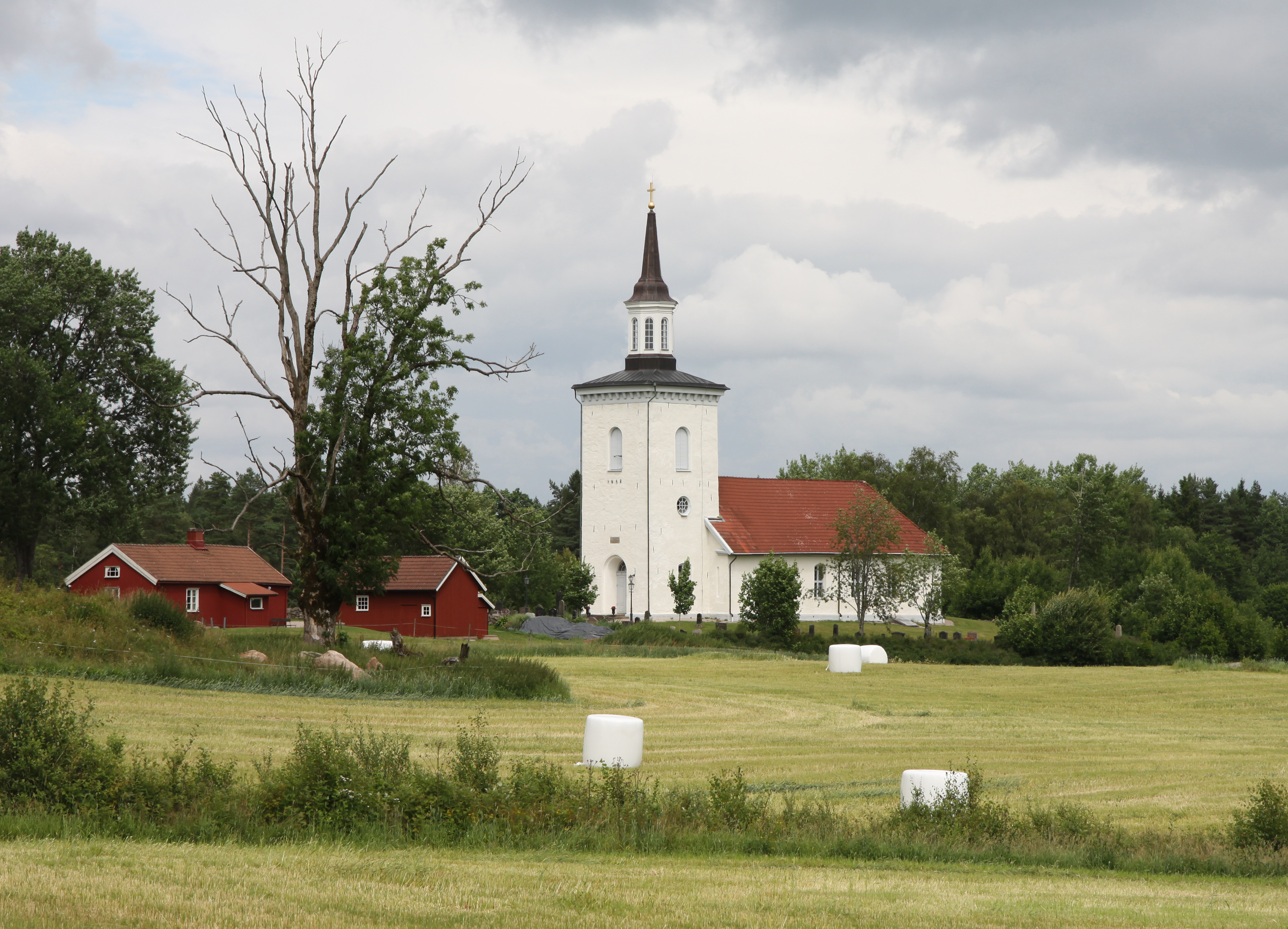 Redslareds kyrka